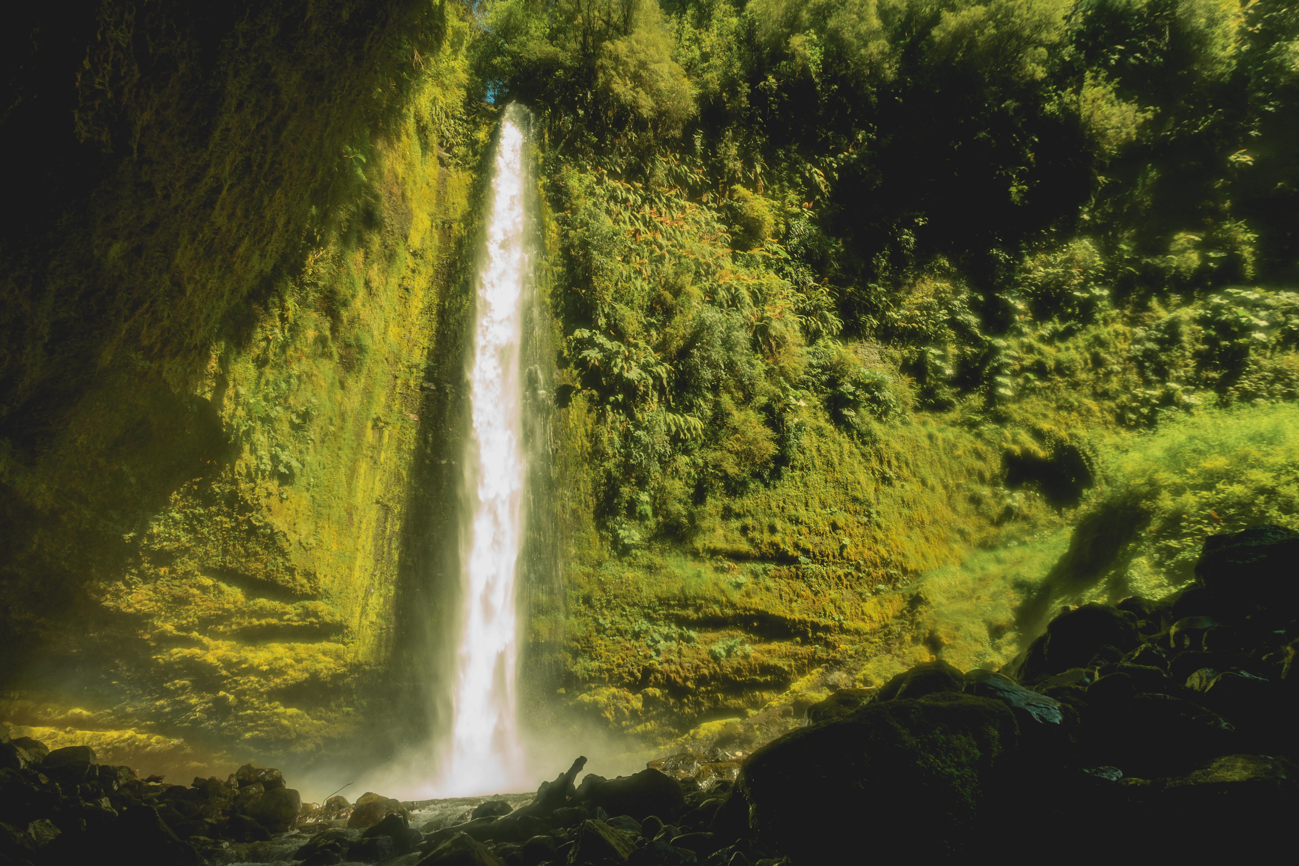 En el sur de Chile, se encuentran reservas naturales y parques. cerca de Puerto Varas, en la ruta del Lago Llanquihue se encuentra esta hermosa cascada